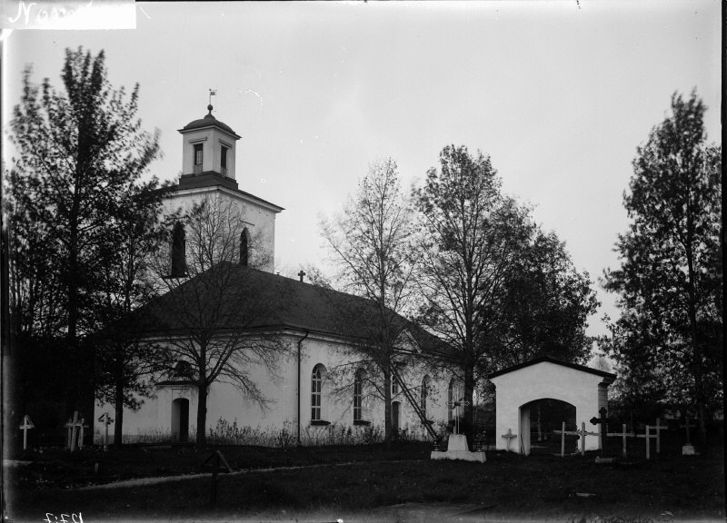 Kyrkan från sydväst. Kategori: (01) ExteriörerKyrkan från sydväst.